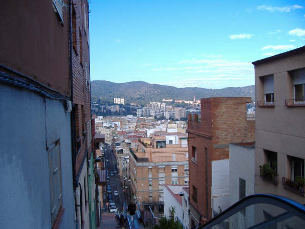 Vista del Carmel des del C/Murtra